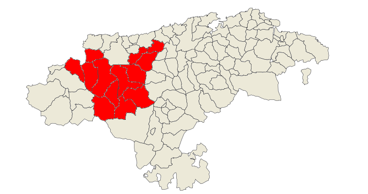 Situación de la Comarca del Saja-Nansa en Cantabria.